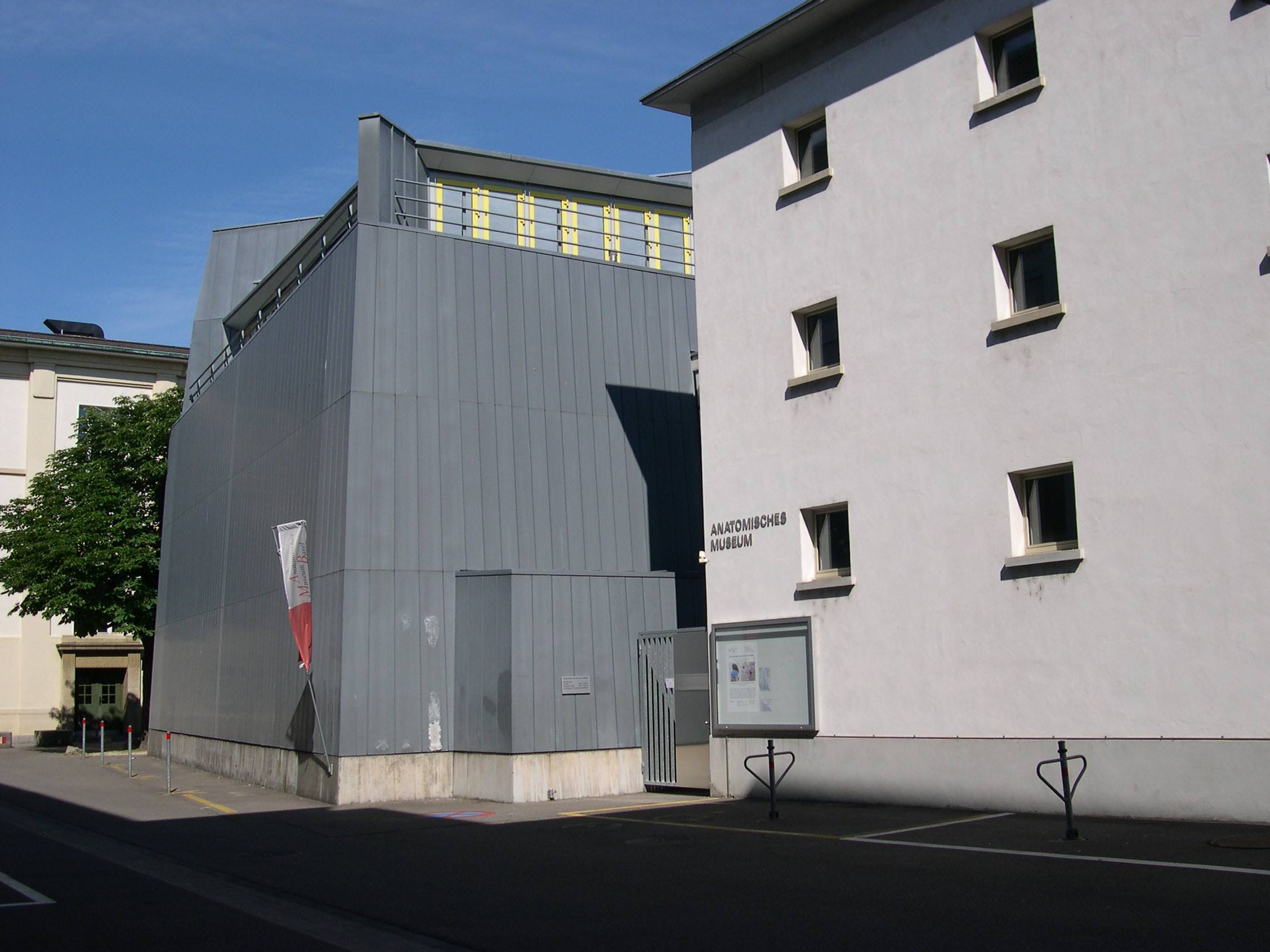 Anatomisches Museum in Basel